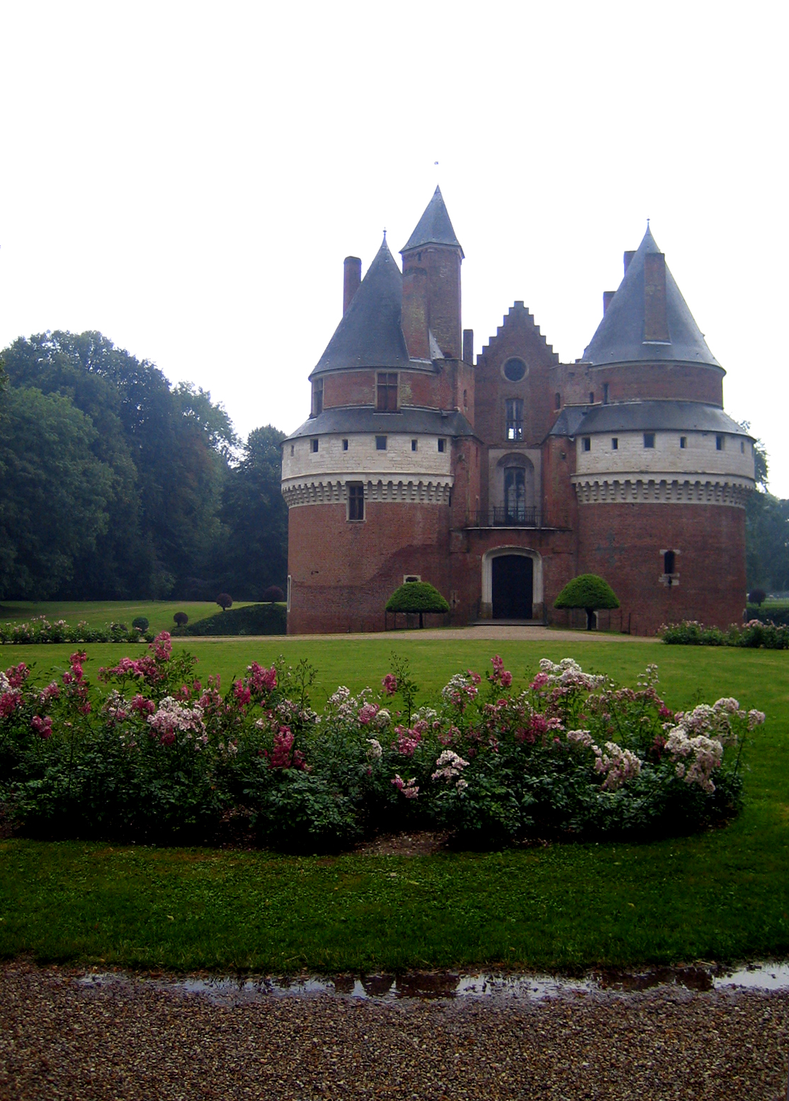 Château de Rambures, après la pluie